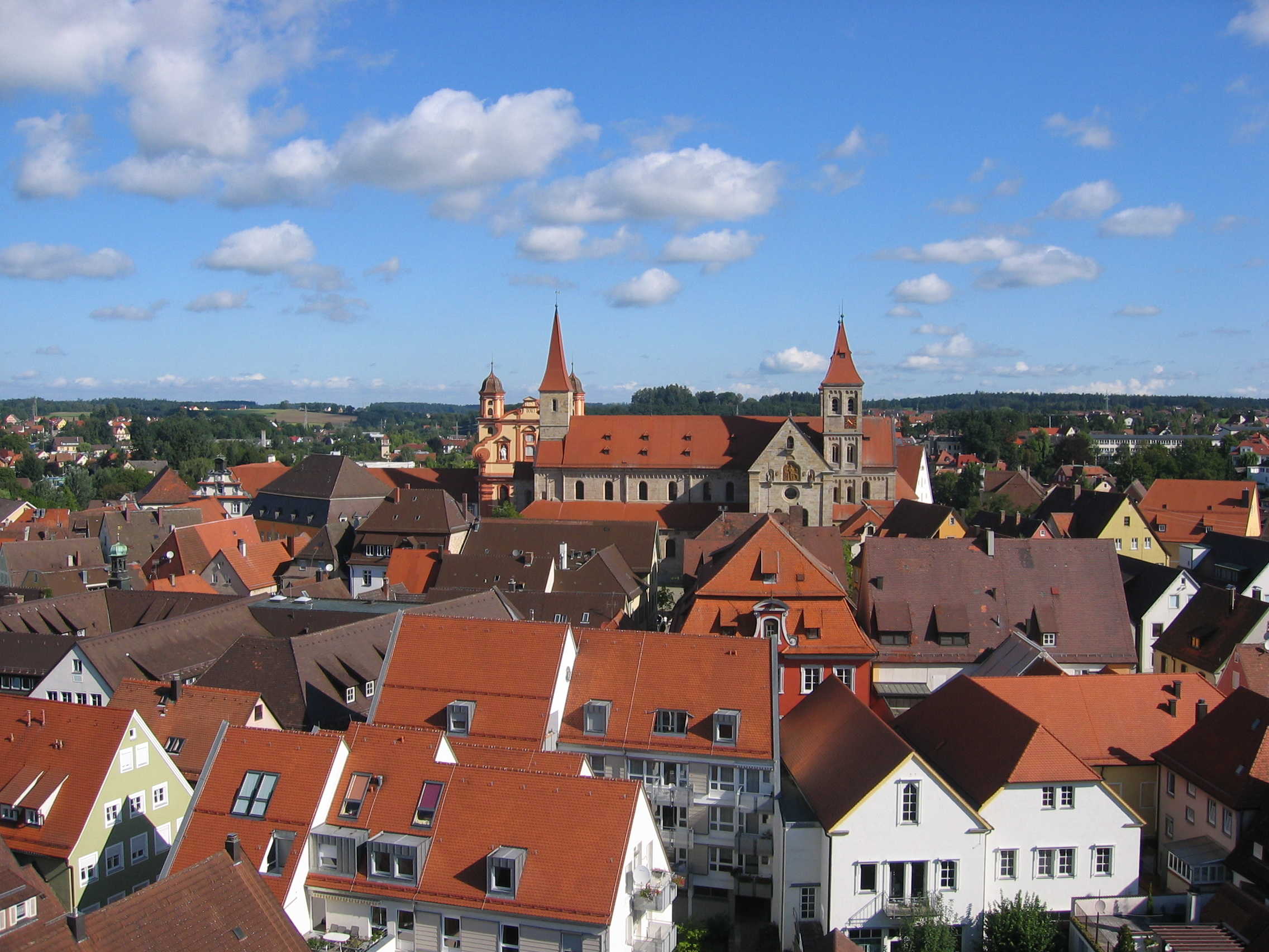 Blick über Teile der Innenstadt von Ellwangen auf die Basilika St. Vitus